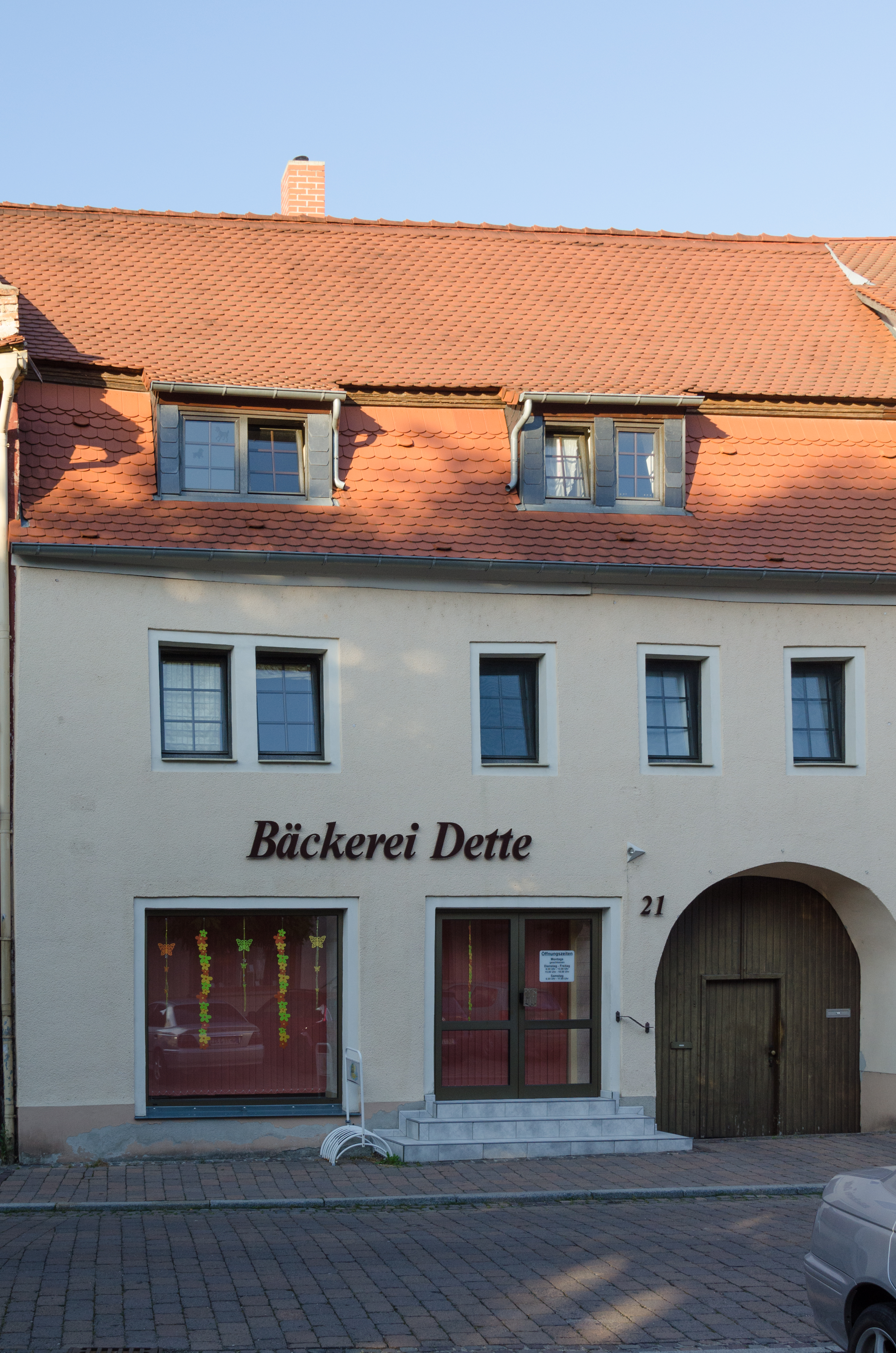 Querfurt, Nebraer Straße 21